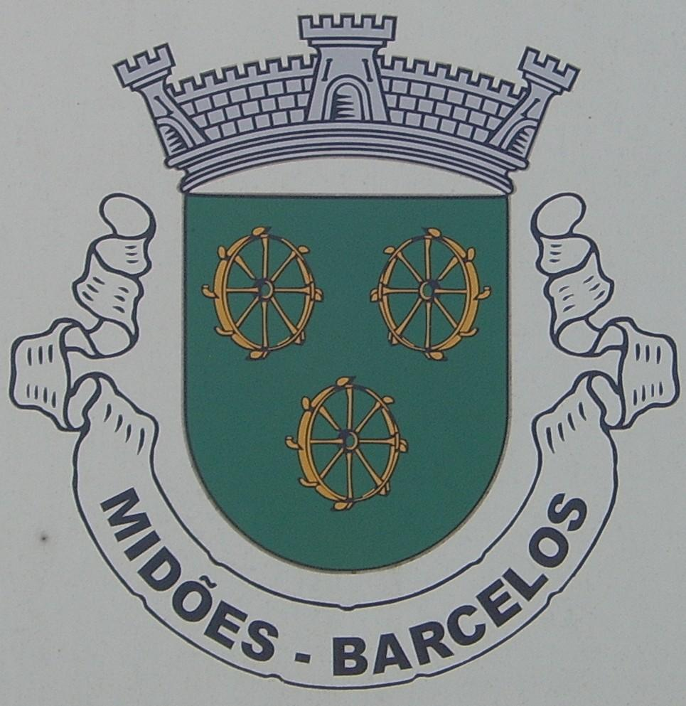 Brasao de midoes barcelos